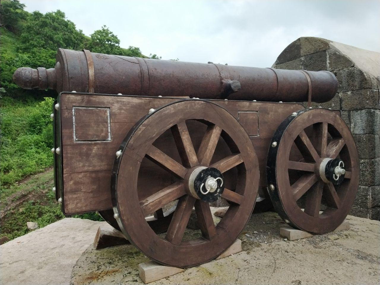 CANNON